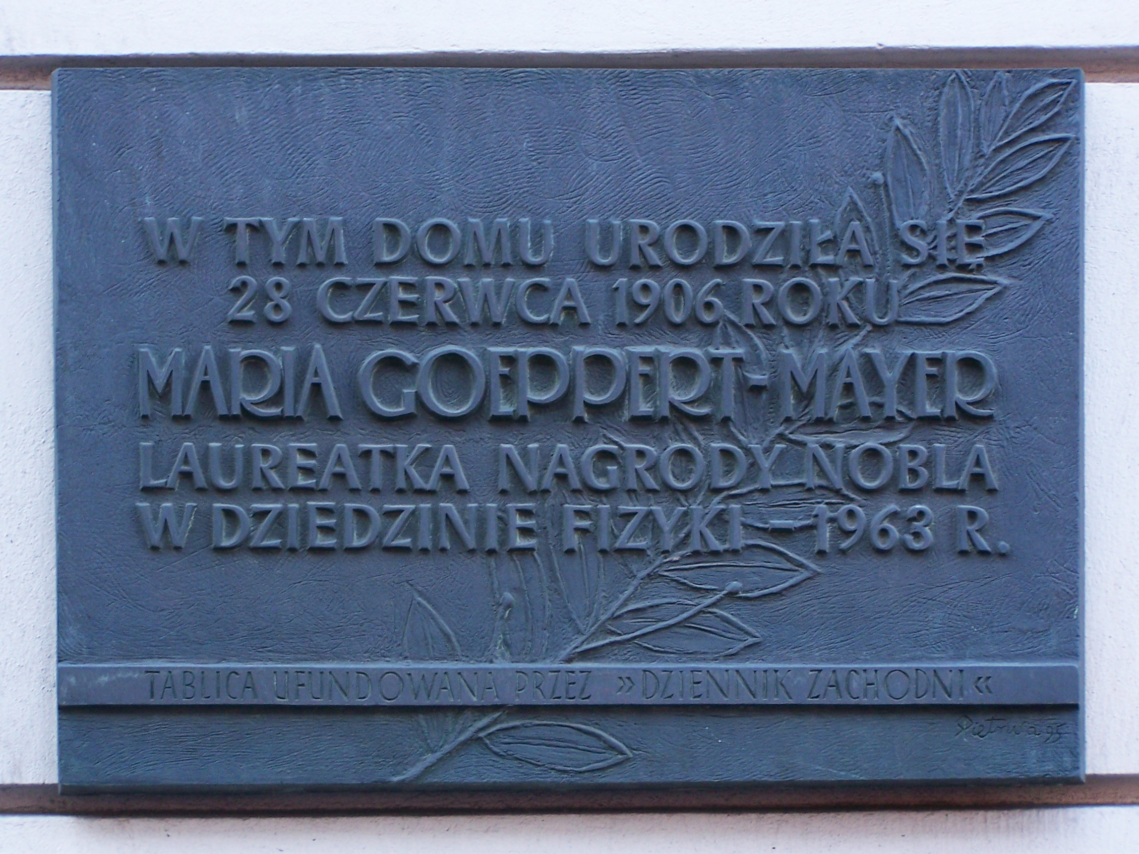 Tablica pamiątkowa na pamiątkę Marii Goeppert-Mayer na ul. Młyńskiej w Katowicach.